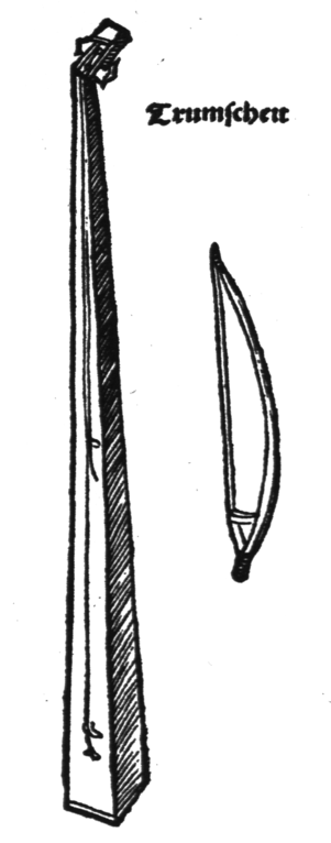 Trumscheit